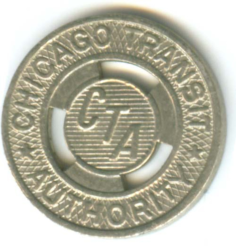 Scan d'un token - Copie d'un de mes token